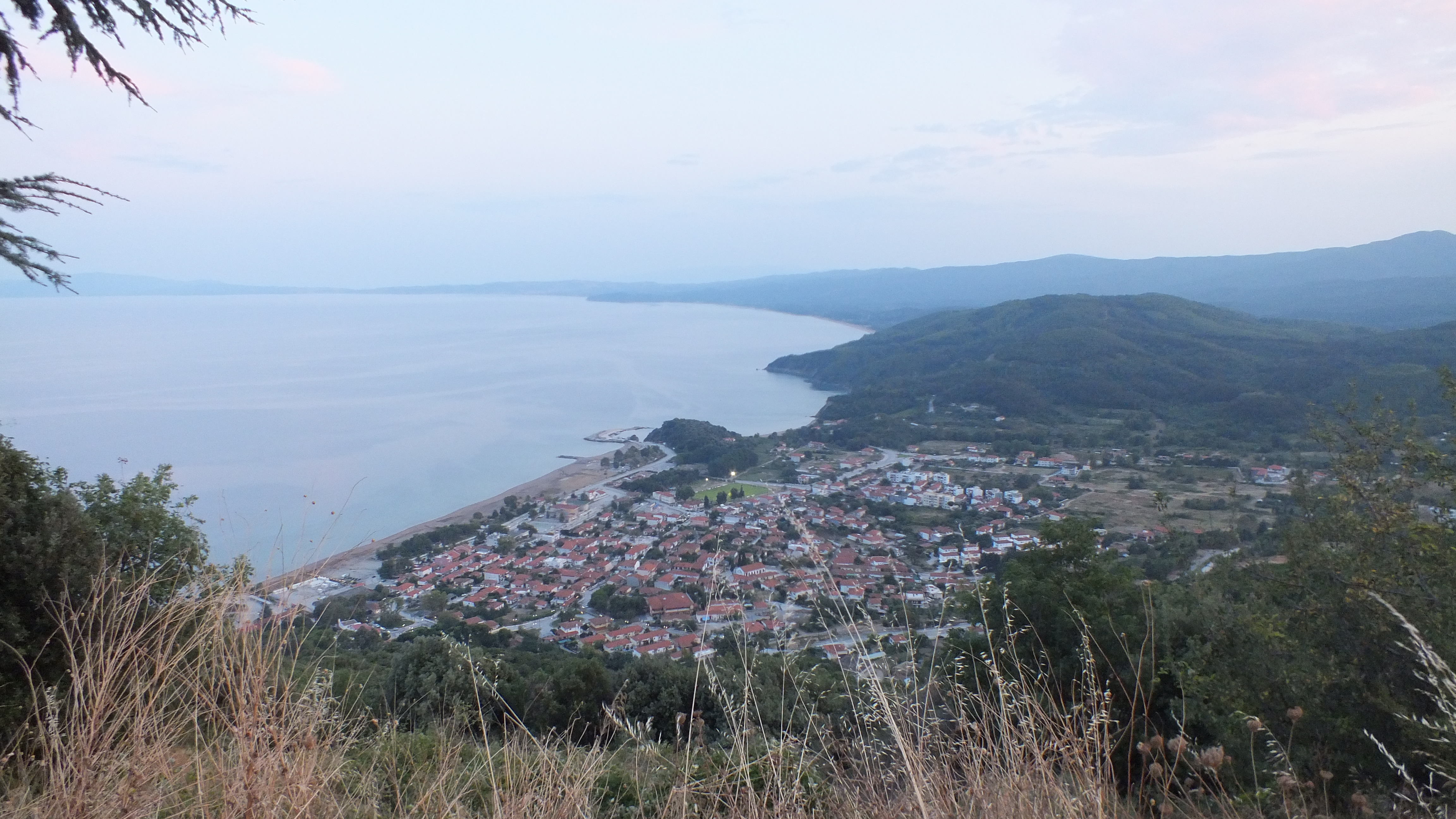 Stratoni